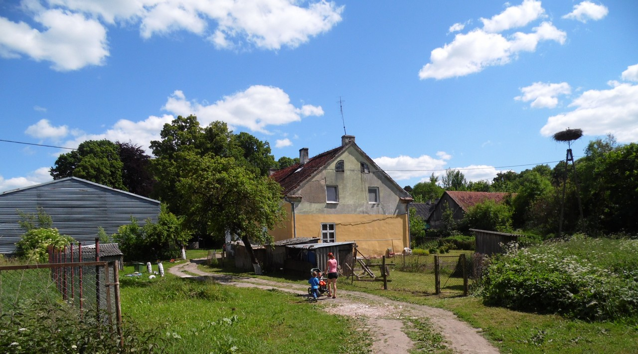 DOMY MIESZKALNE.